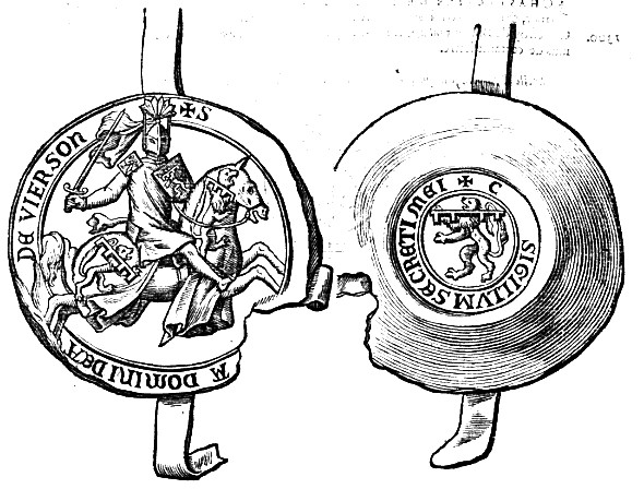 Godefroy d'Aerschot